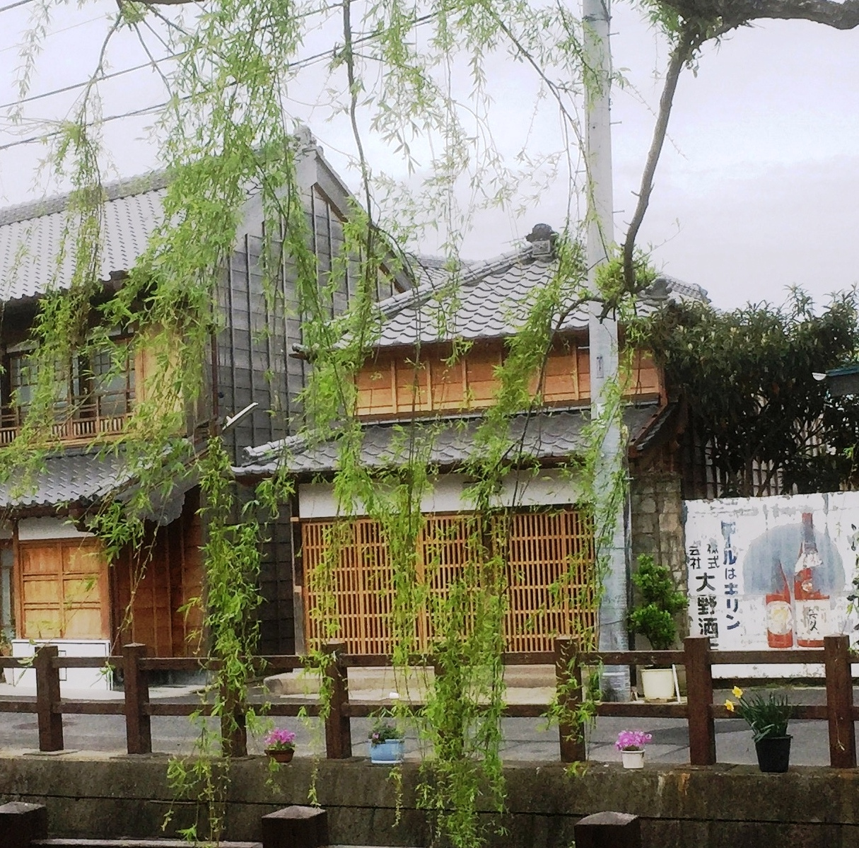 千葉県香取市、小野川沿いの建物。東京大学と佐原高校の共同プロジェクト「さわら部」で、「さわらぼ」として使用された。